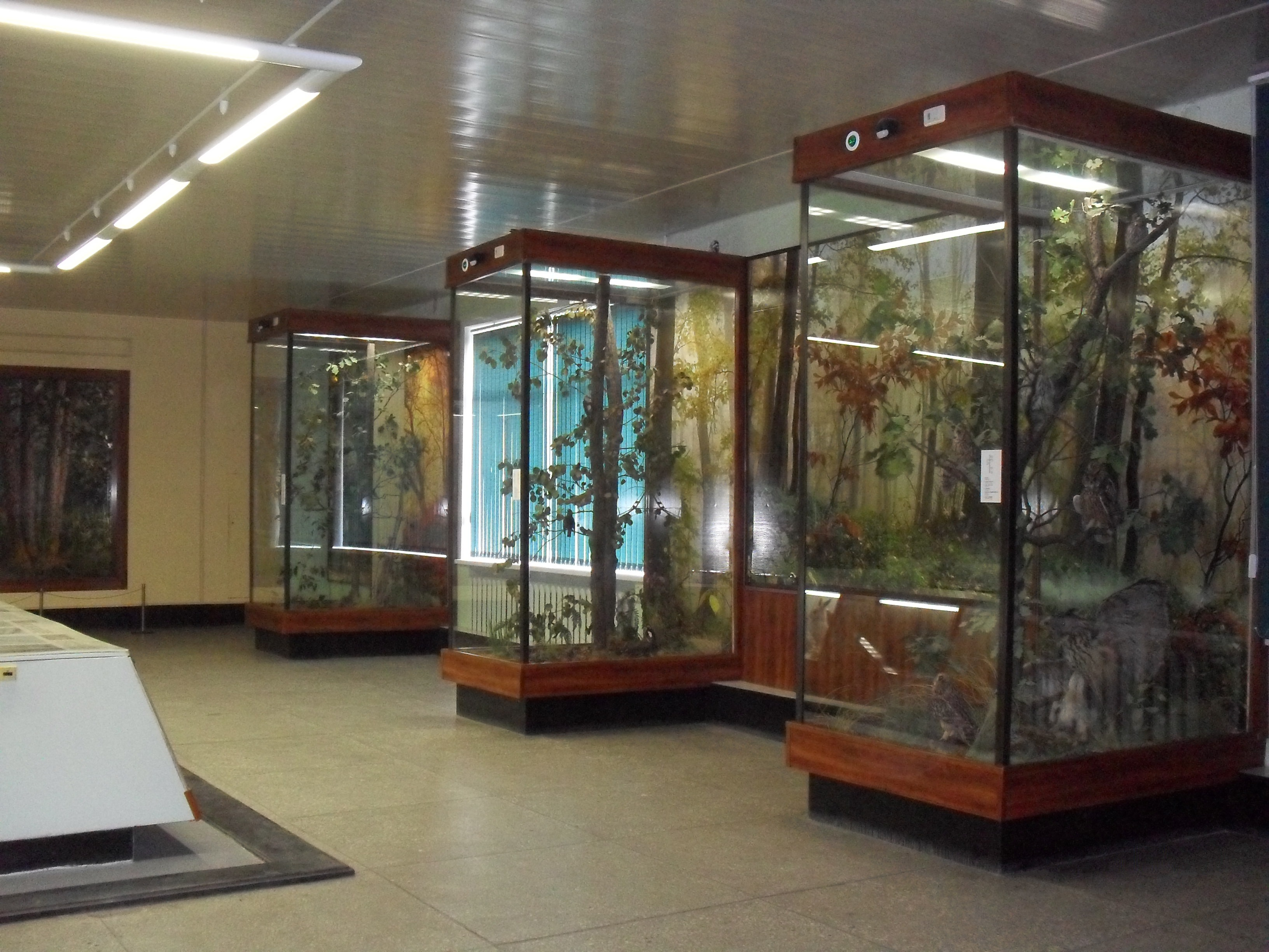 В одной из комнат музея Воронежского заповедника